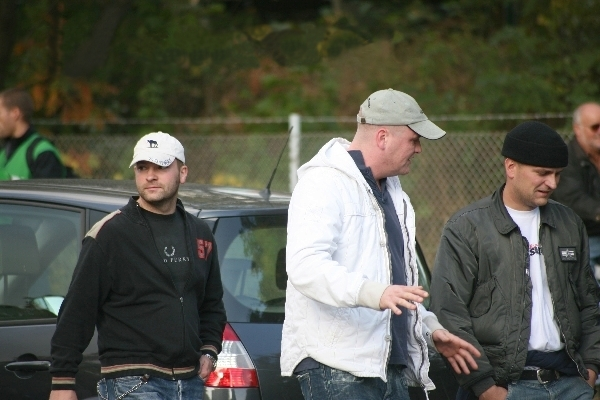 Mehr als 1000 Neonazis beteiligten an einer Solidaritätsdemo für den Landser-Sänger Michael Regener (alias Lunikoff) am 21. Oktober 2006 in Berlin. Hier in der Bildmitte der Sänger der Hooligan Band Kategorie C (KC) Hannes Ostendorf (mit Basecap) der bei einem Solidaritätskonzert für Regener vor der Justizvollzugsanstalt Berlin-Tegel auftrat.